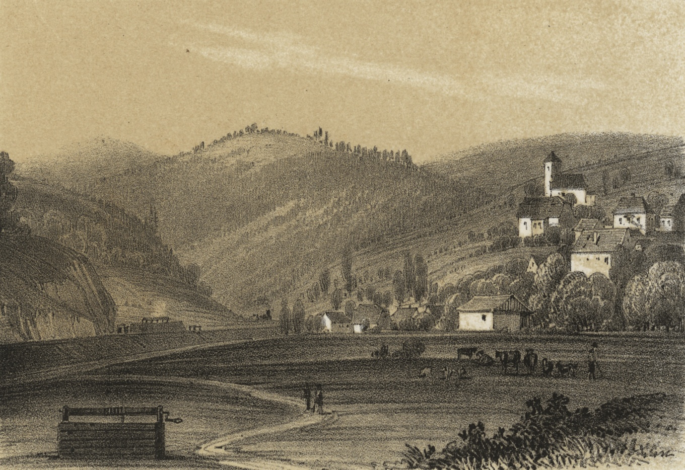 Hochstein